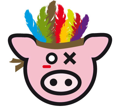 Villanella